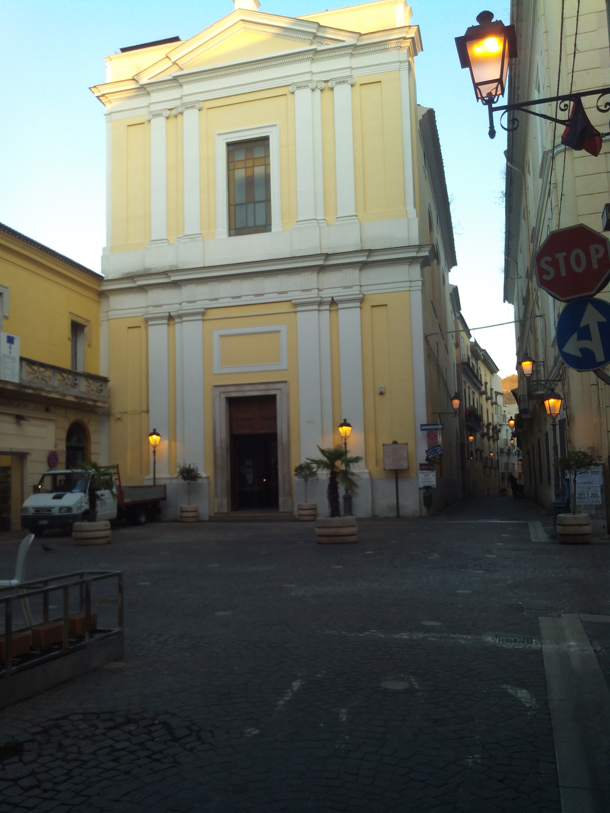 Chiesa Caserta